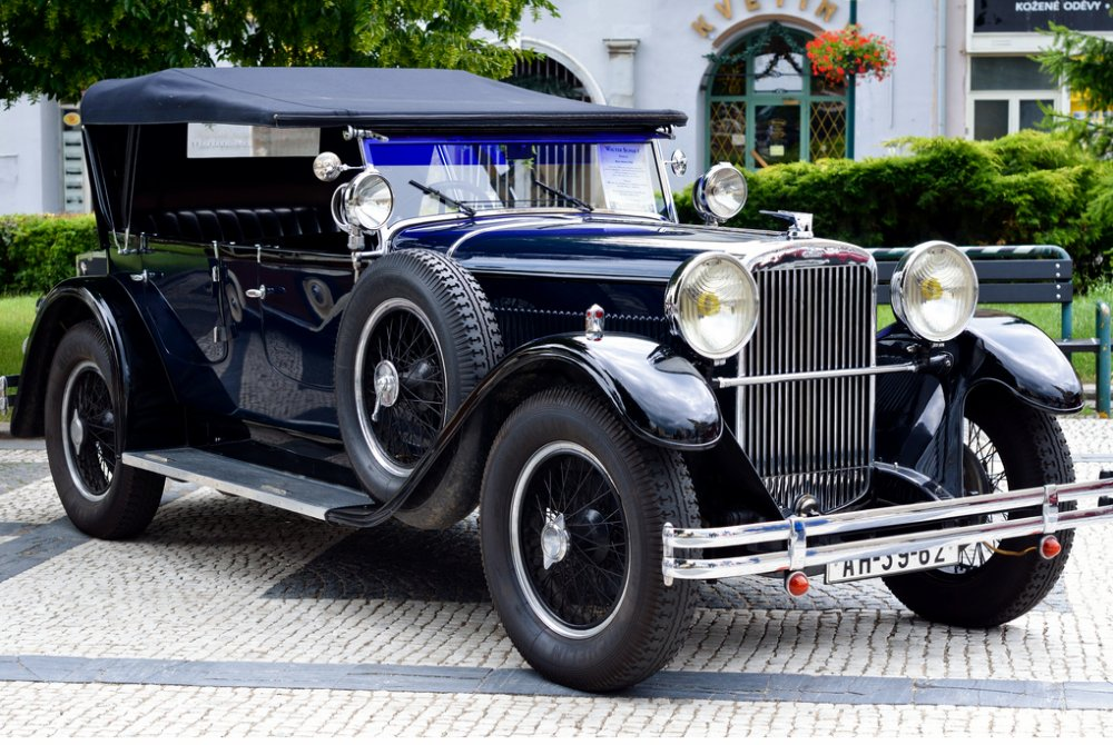 Walter Super 6 faeton (1930)